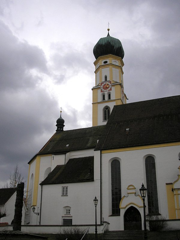 Wallfahrtskirche St. Leonhard (Inchenhofen, Landkreis Aichach-Friedberg, Bayerisch-Schwaben). Ansicht von Norden. Eigene Aufnahme, Jan. 2007 / Pilgrimage church St. Leonhard (Inchenhofen near Aichach, Bavaria, Germany). View from the north. Own photo, Jan. 2007